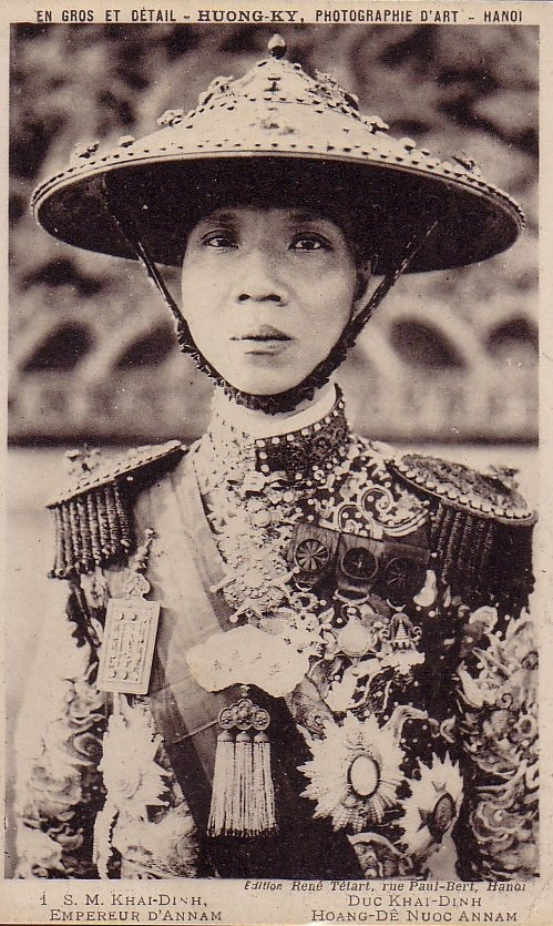 Emperor Khải Định